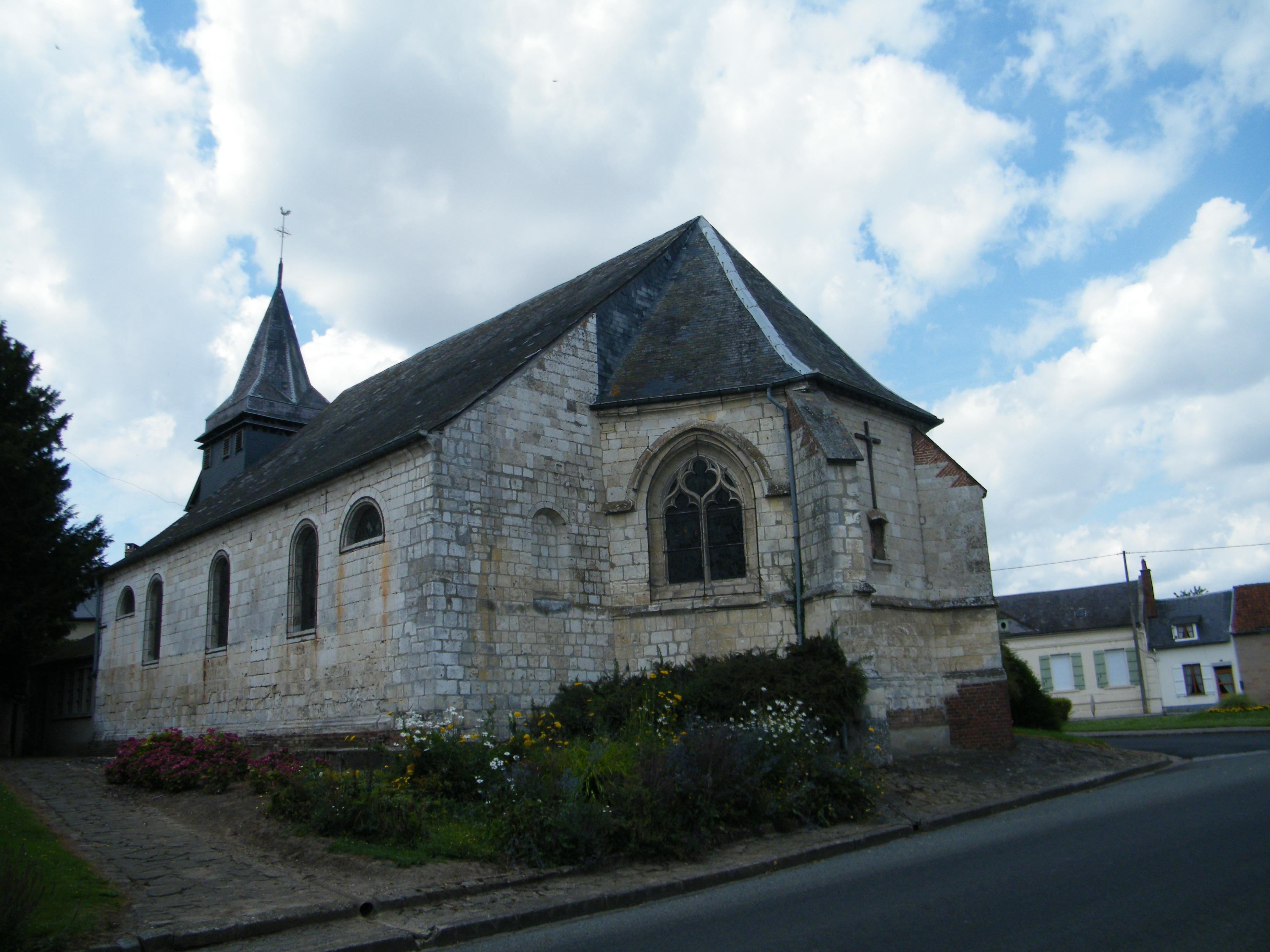 église.